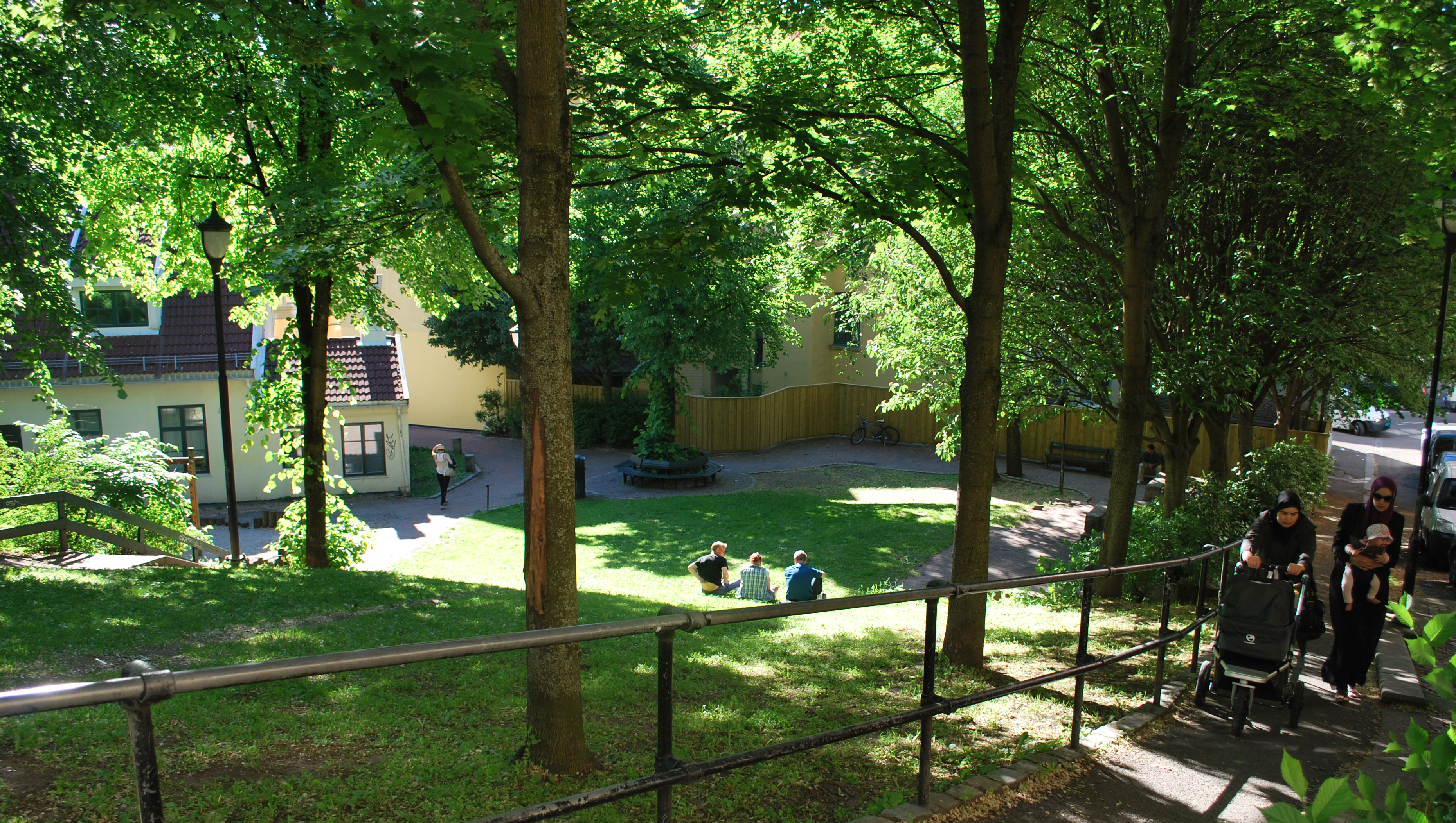 Parken Gartnerløkka, mellom Grønland og Enerhaugen, Oslo, sett fra Sørligata (toppen av parken)